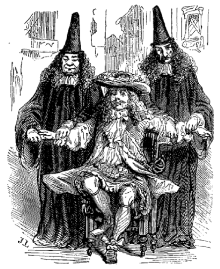 Illustration de la pièce de Molière, Monsieur de Pourceaugnac. Deux médecins prennent le pouls de Monsieur de Pourceaugnac, acte I, scène XI.